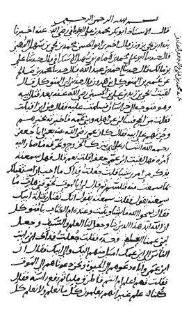 Oldest document from Sahifa Sajjadiyya size: 262 x 448